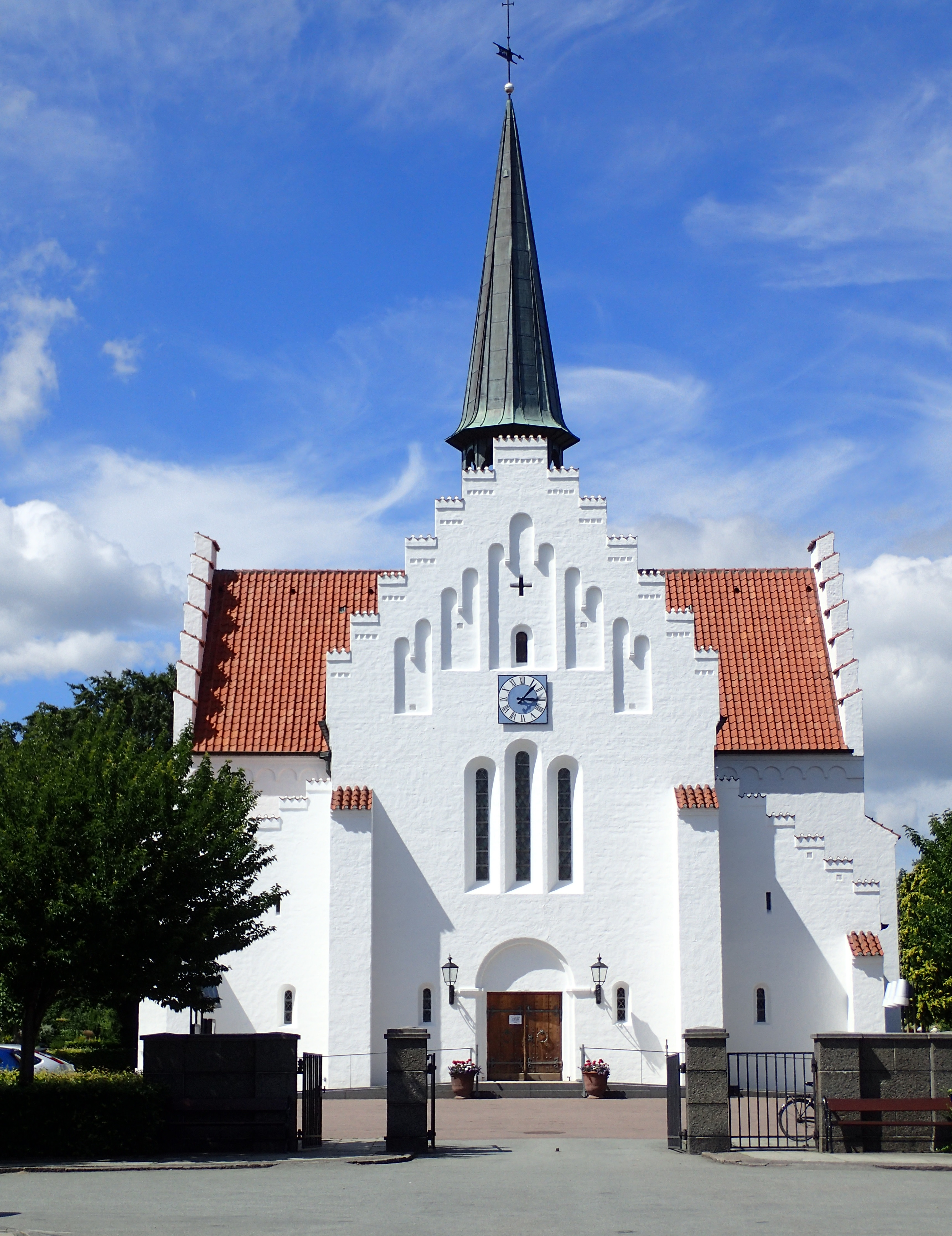 Åbyhøj Kirke